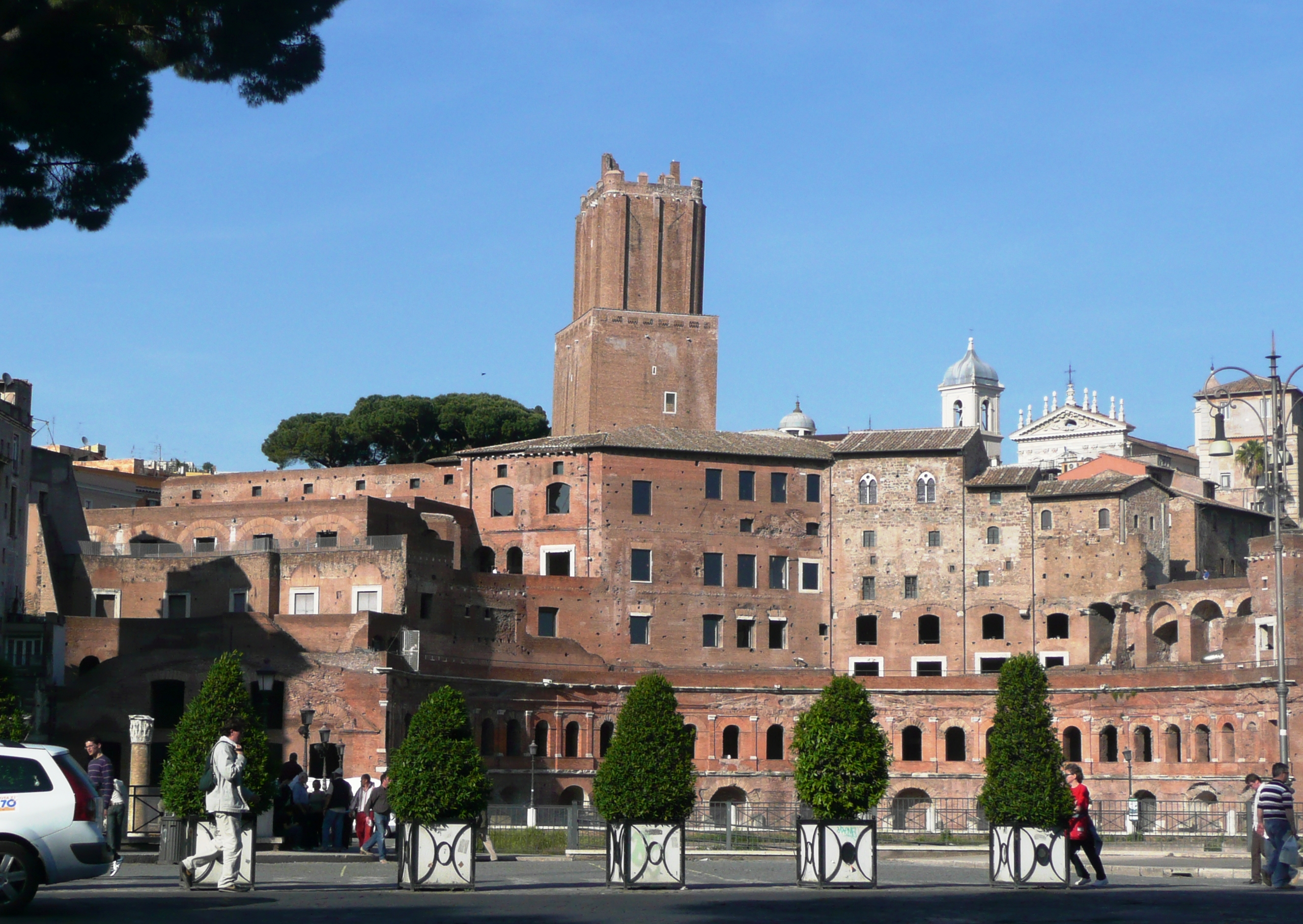 Ринок Траяна у Римі